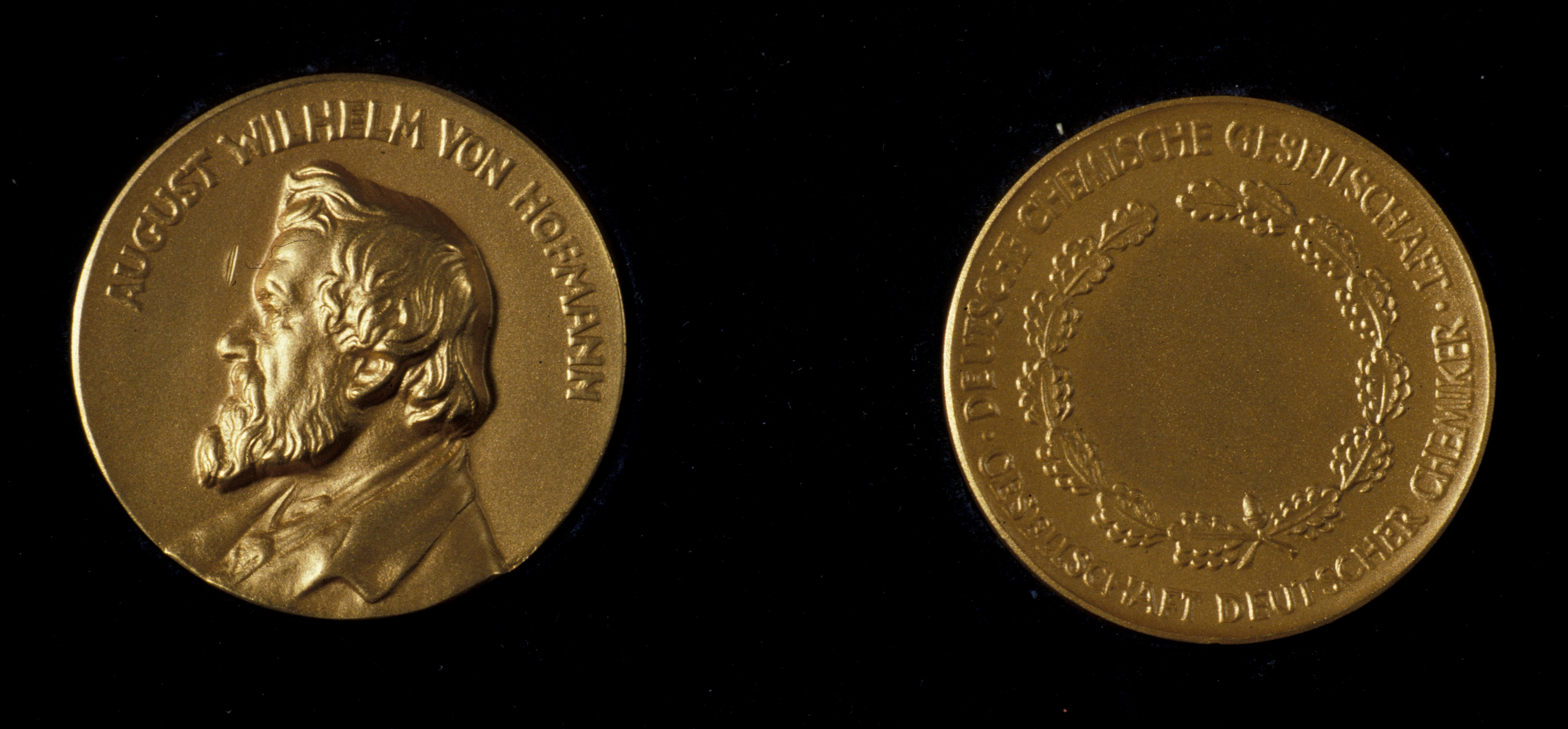 Abbildung der Medaille (Vor- und Rückseite)